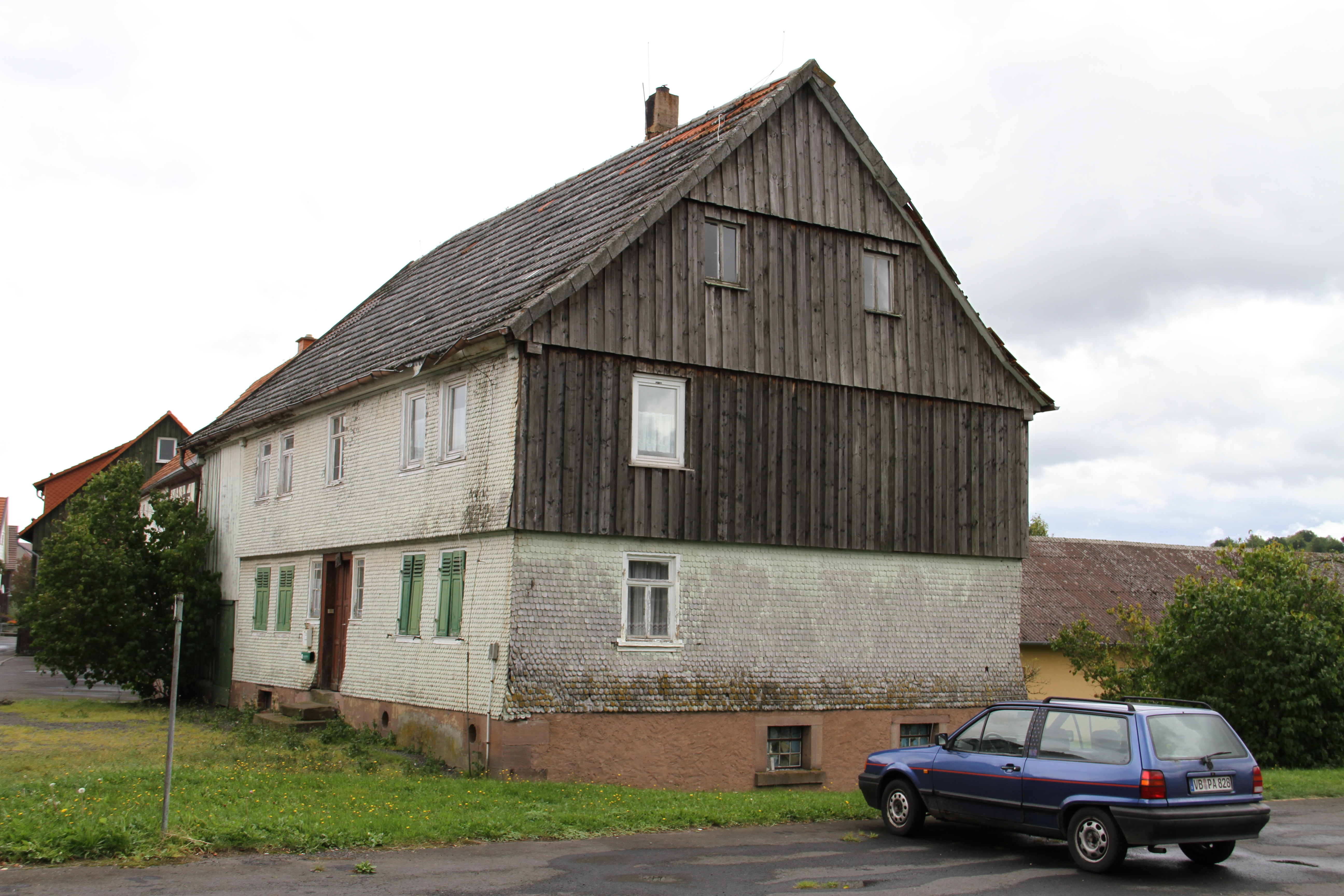 Dieses Foto entstand im Rahmen des Projekts Wiki Loves Monuments Mittelhessen, das aus dem Community-Projektbudget von Wikimedia Deutschland e. V. gefördert wurde.